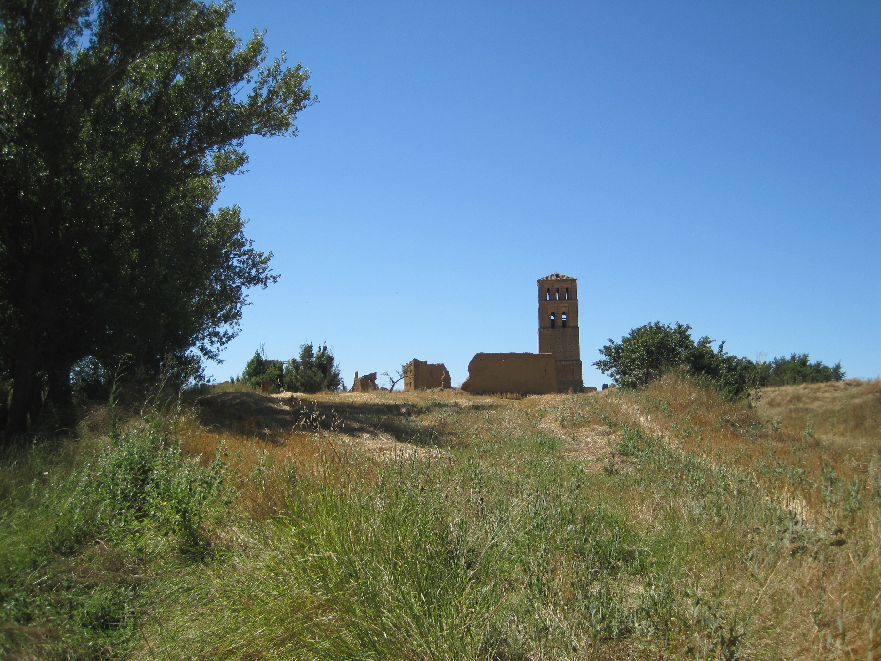 Despoblado de Villacreces (Valladolid, España).